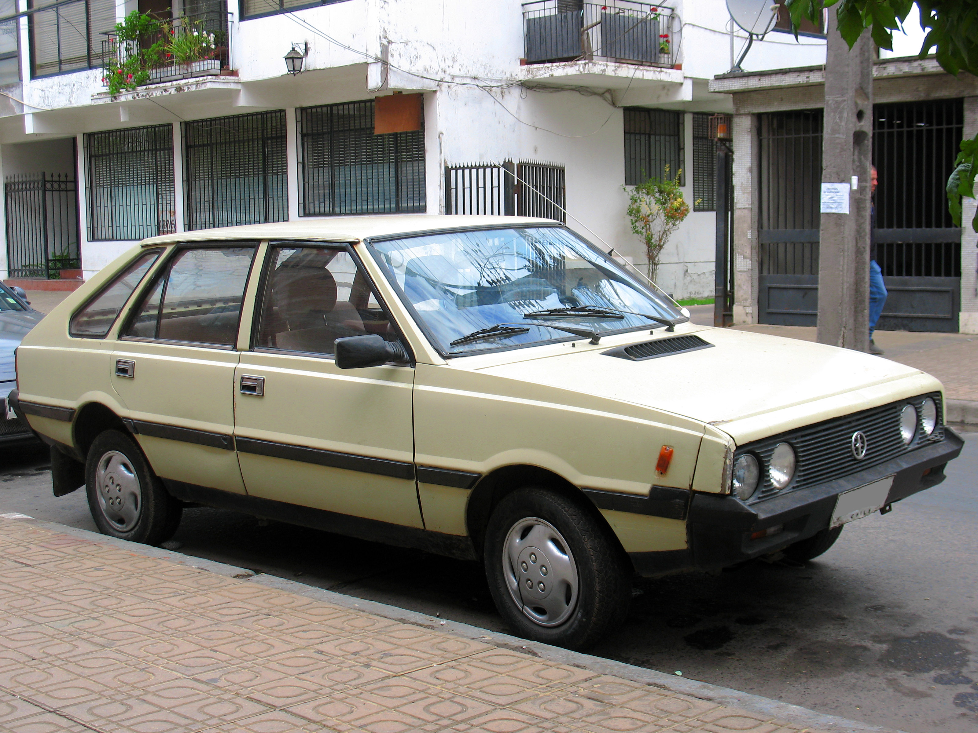 FSO Polonez 1500 1990